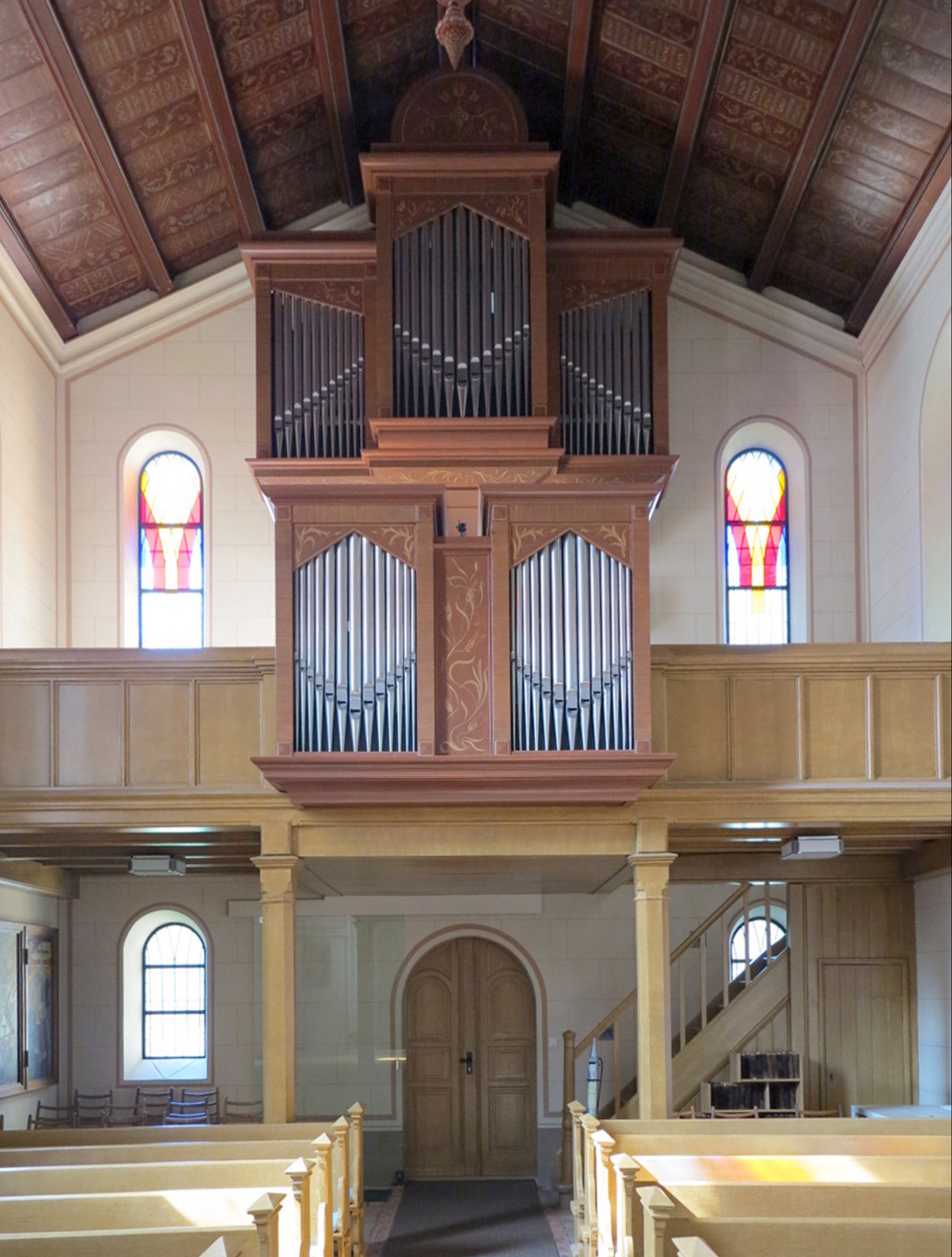 Evangelische Dorfkirche Glienicke/Nordbahn: Westseite des Kirchraums mit Empore und Orgel nach der Umgestaltung 2013/2014 (Aufnahme 2014)